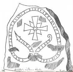 U755, runsten.